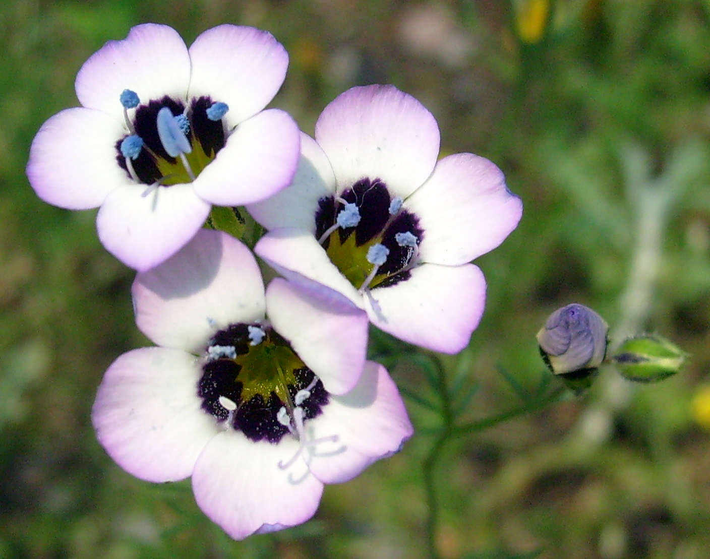 Eden Project